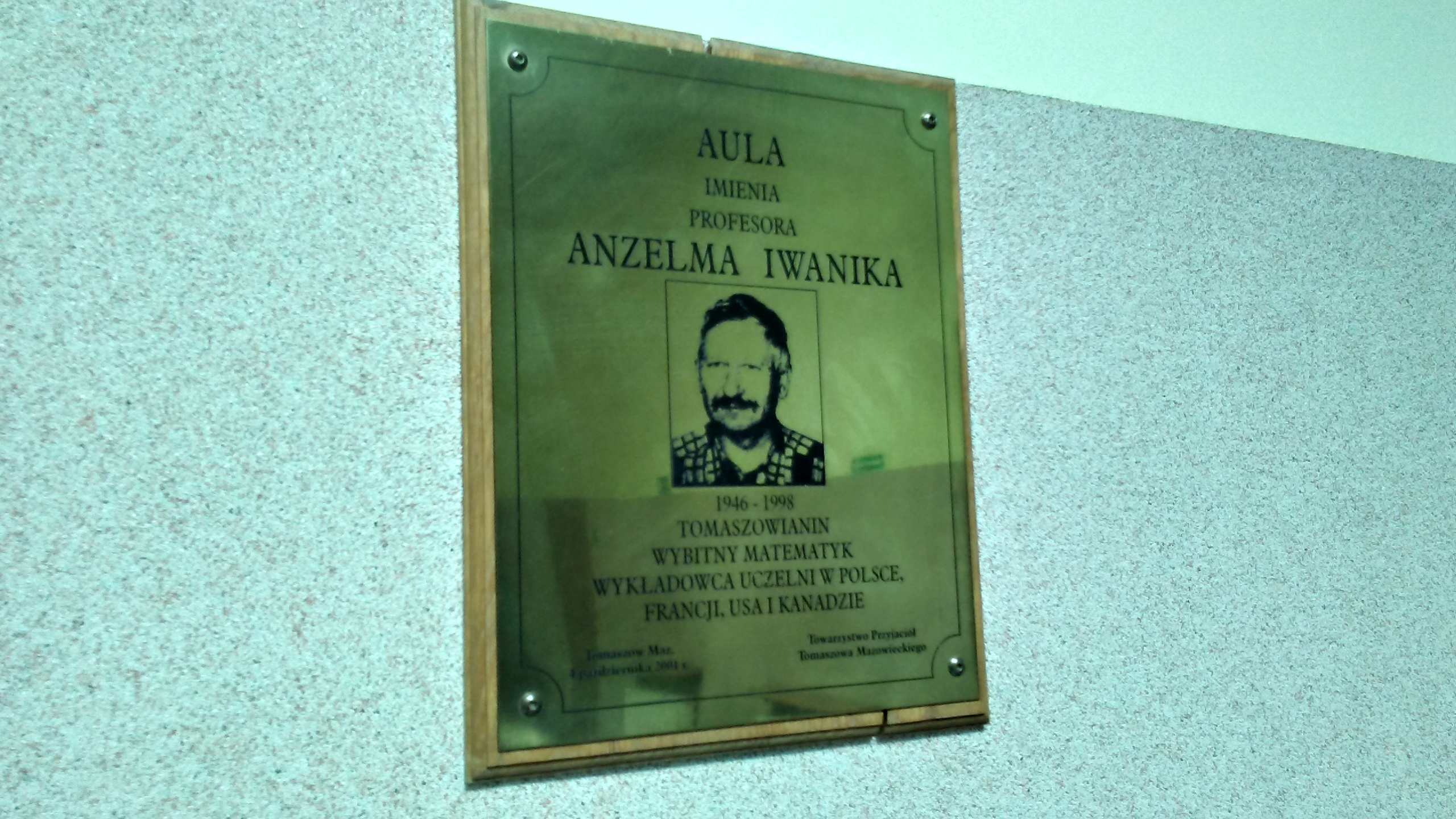 Tomaszów Mazowiecki w województwie łódzkim, PL, EU. Filia Uniwersytetu Łódzkiego. Tabliczka przed aulą im.Anzelma Iwanika wybitnego matematyka pochodzącego z Tomaszowa Mazowieckiego